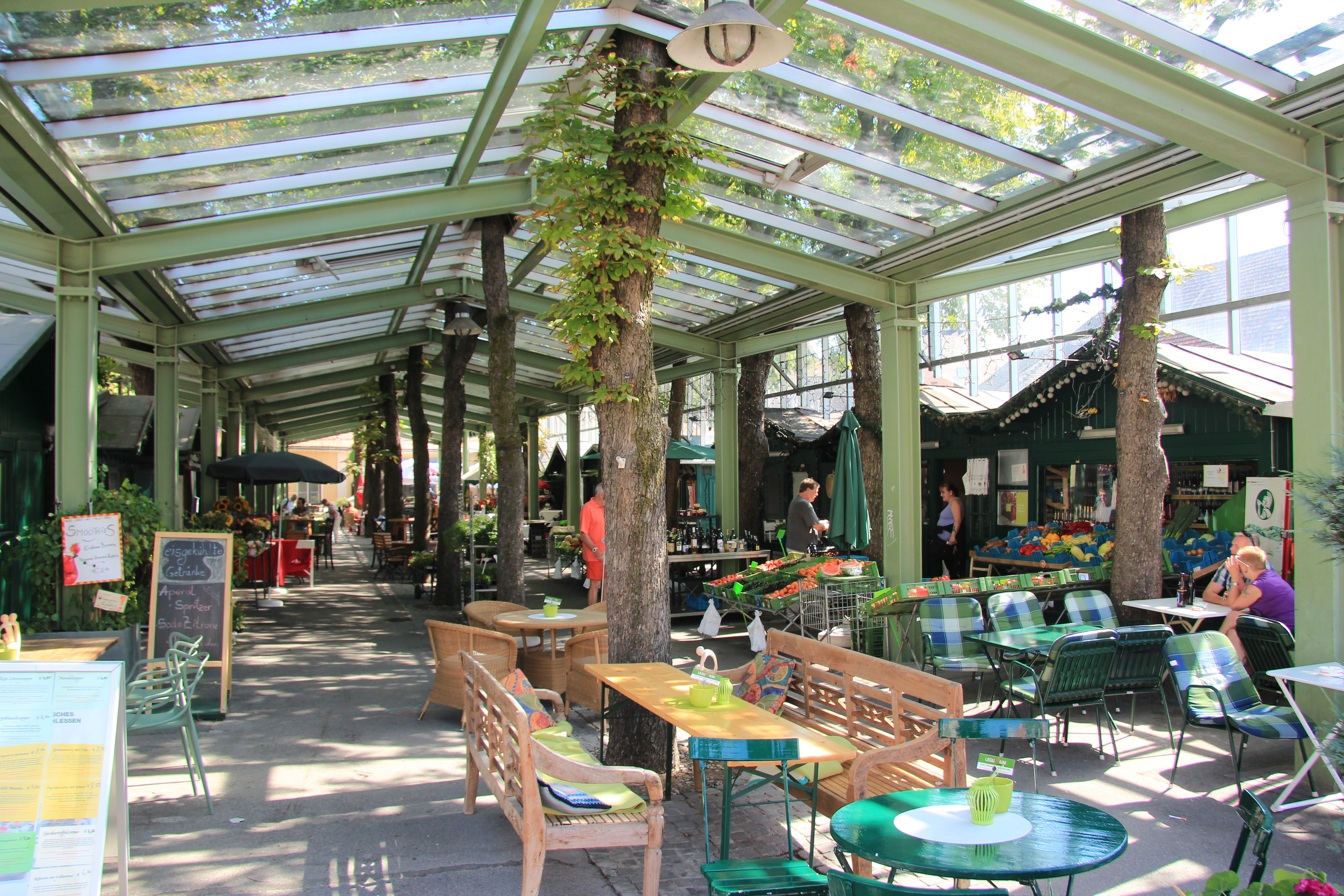 Grünmarkt in Baden, Niederösterreich